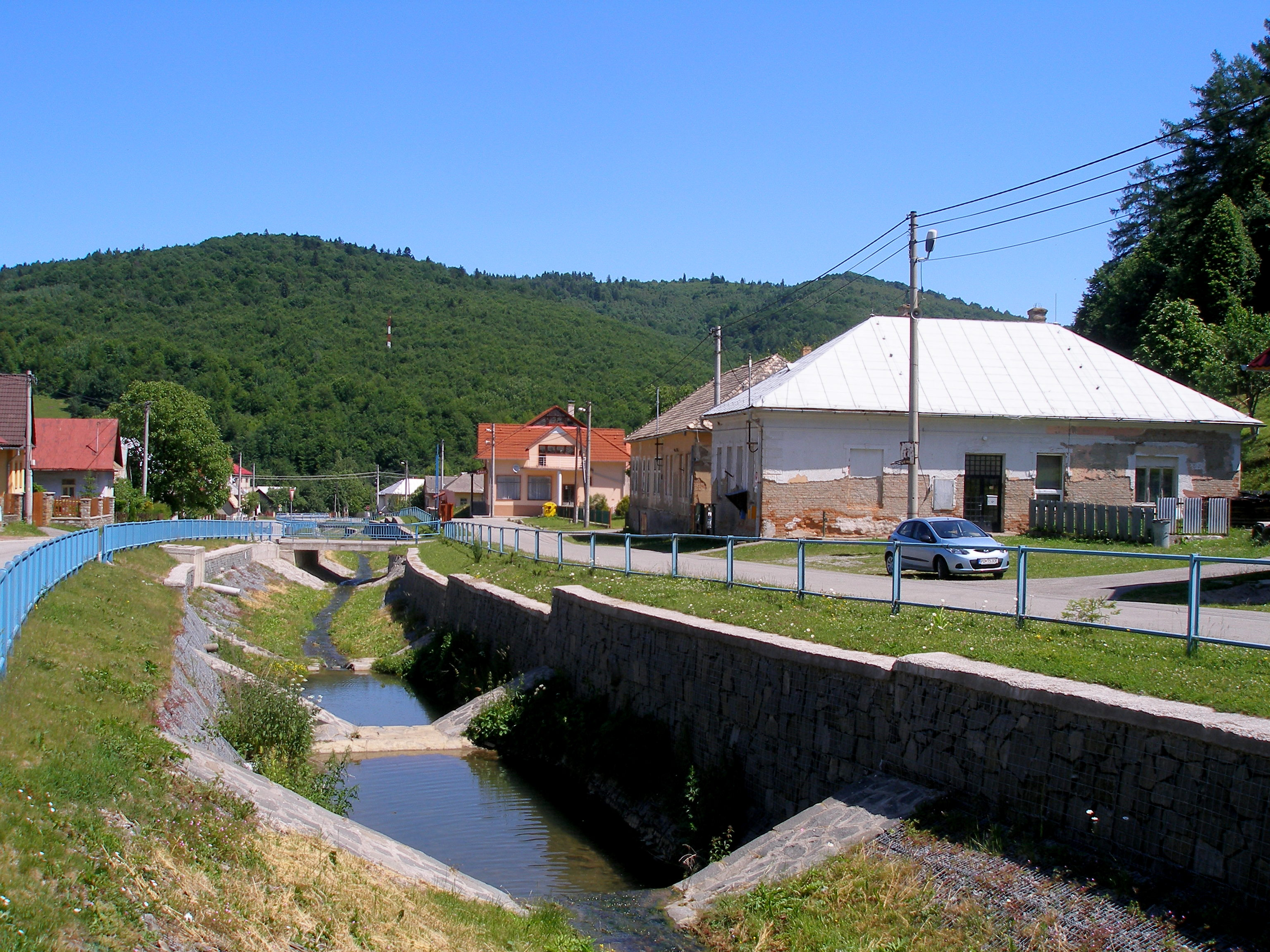 Obec Renčišov okres Sabinov